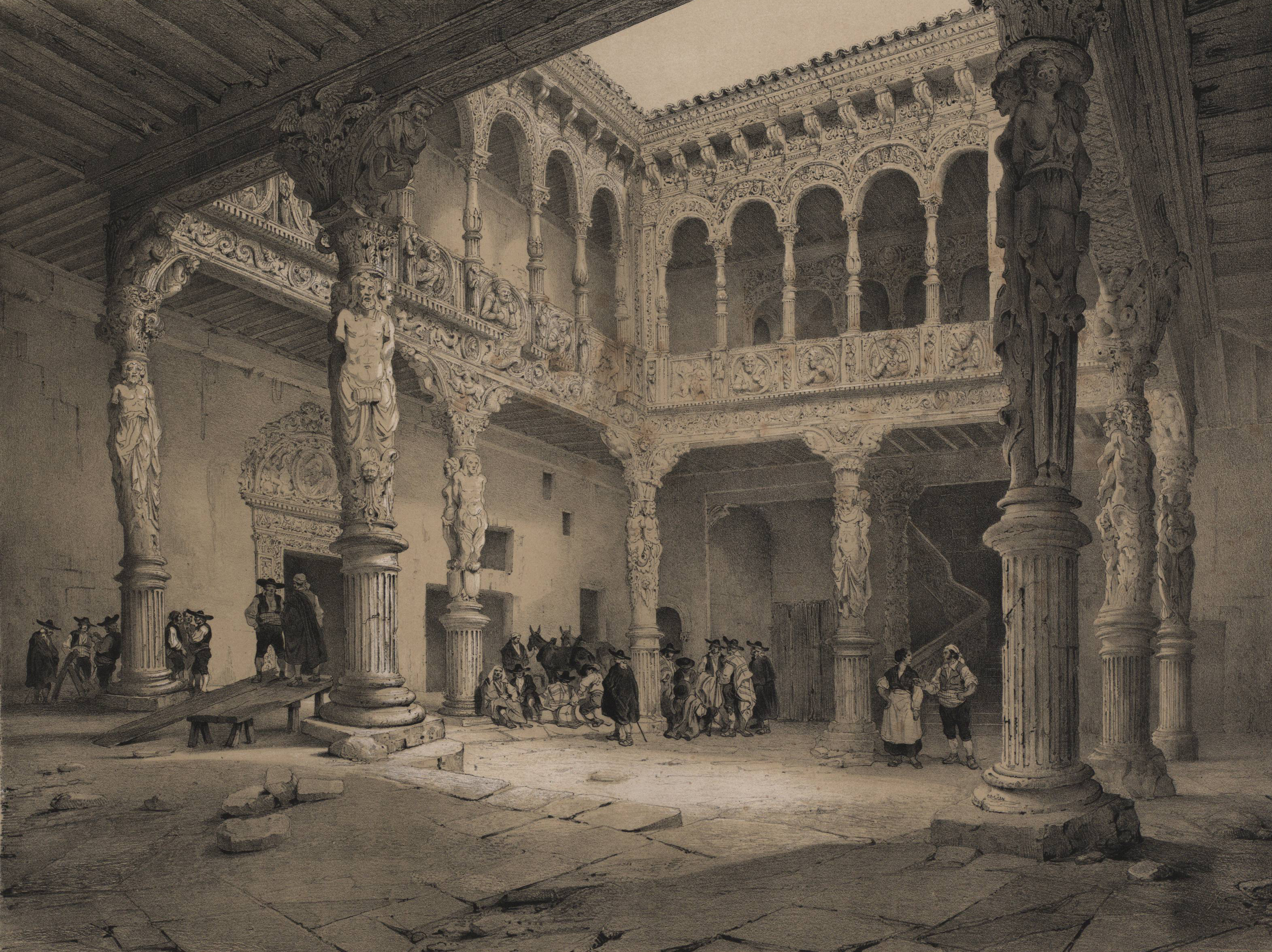 Patio de la Ynfanta en Zaragoza.